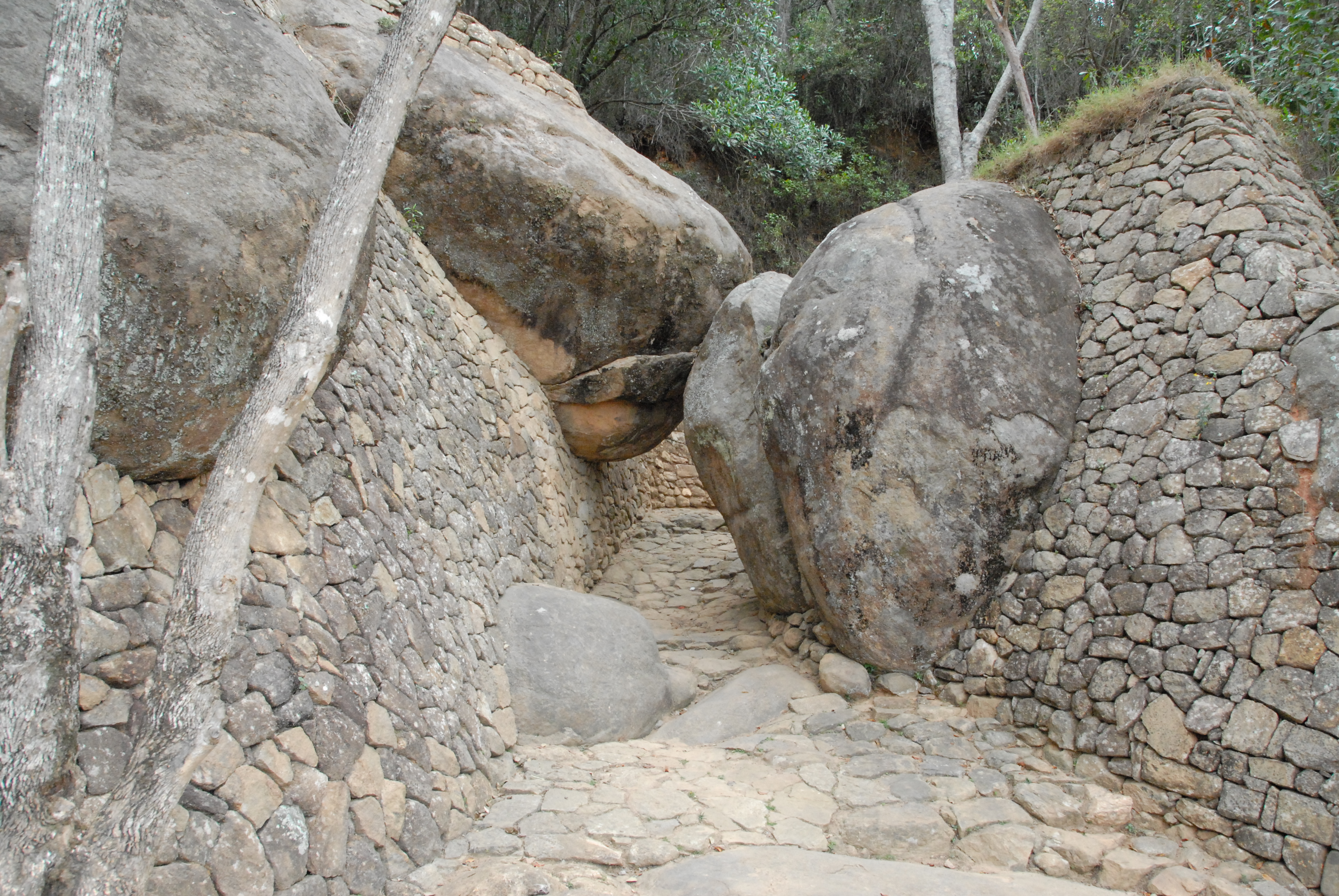 Madagascar Ambohimanga système de défense de la colline et du palais royal